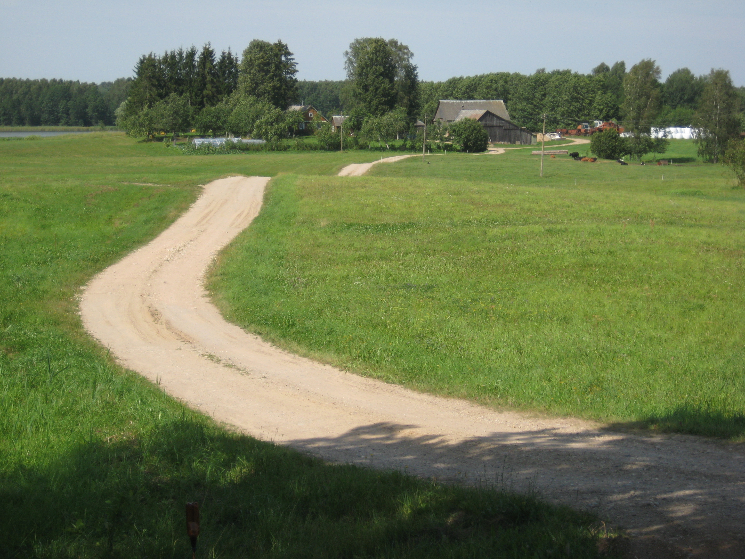 Bileišiai 32300, Lithuania